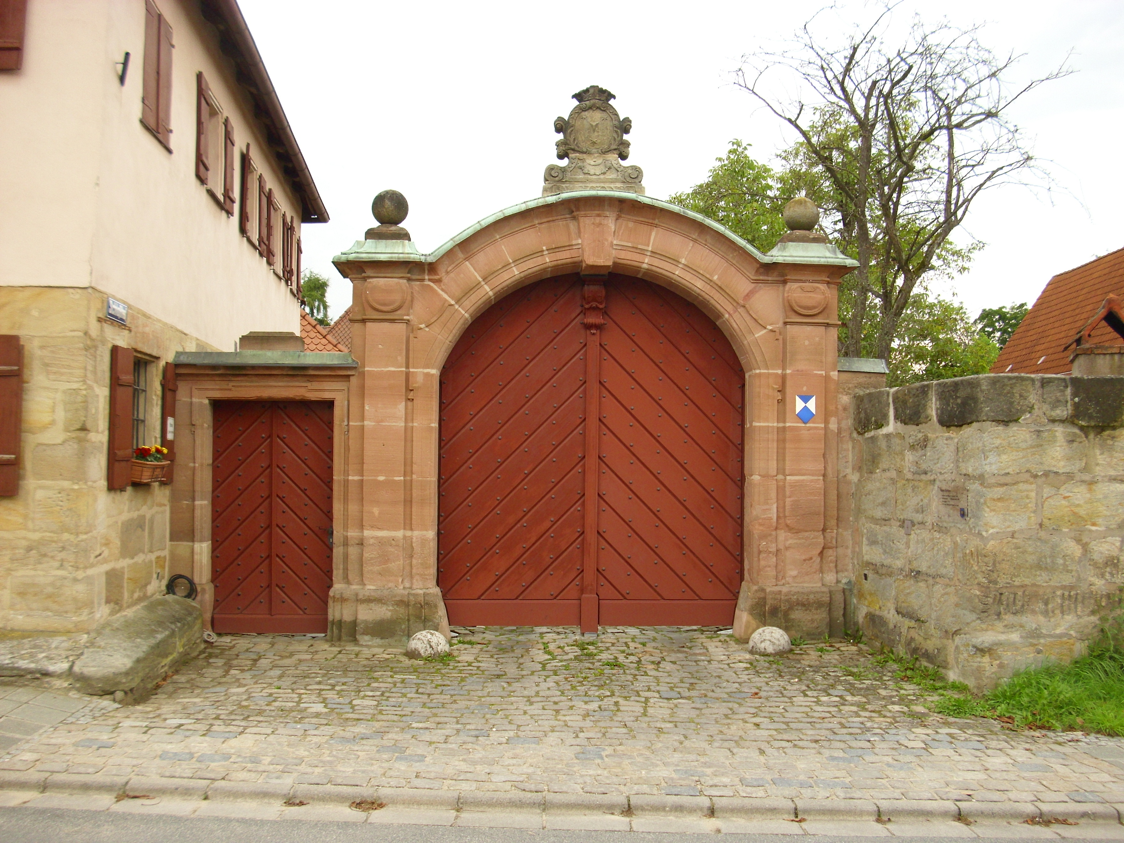 Eingang zum Anwesen „Rotes Schloss 1“ am Oberen Markt von Heroldsberg